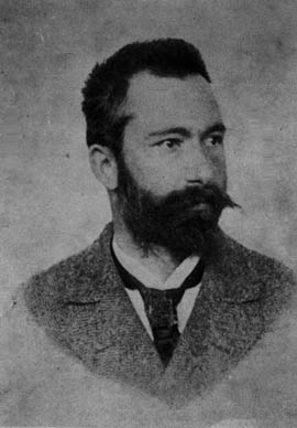 Milivoj Šrepel (1862 - 1905)